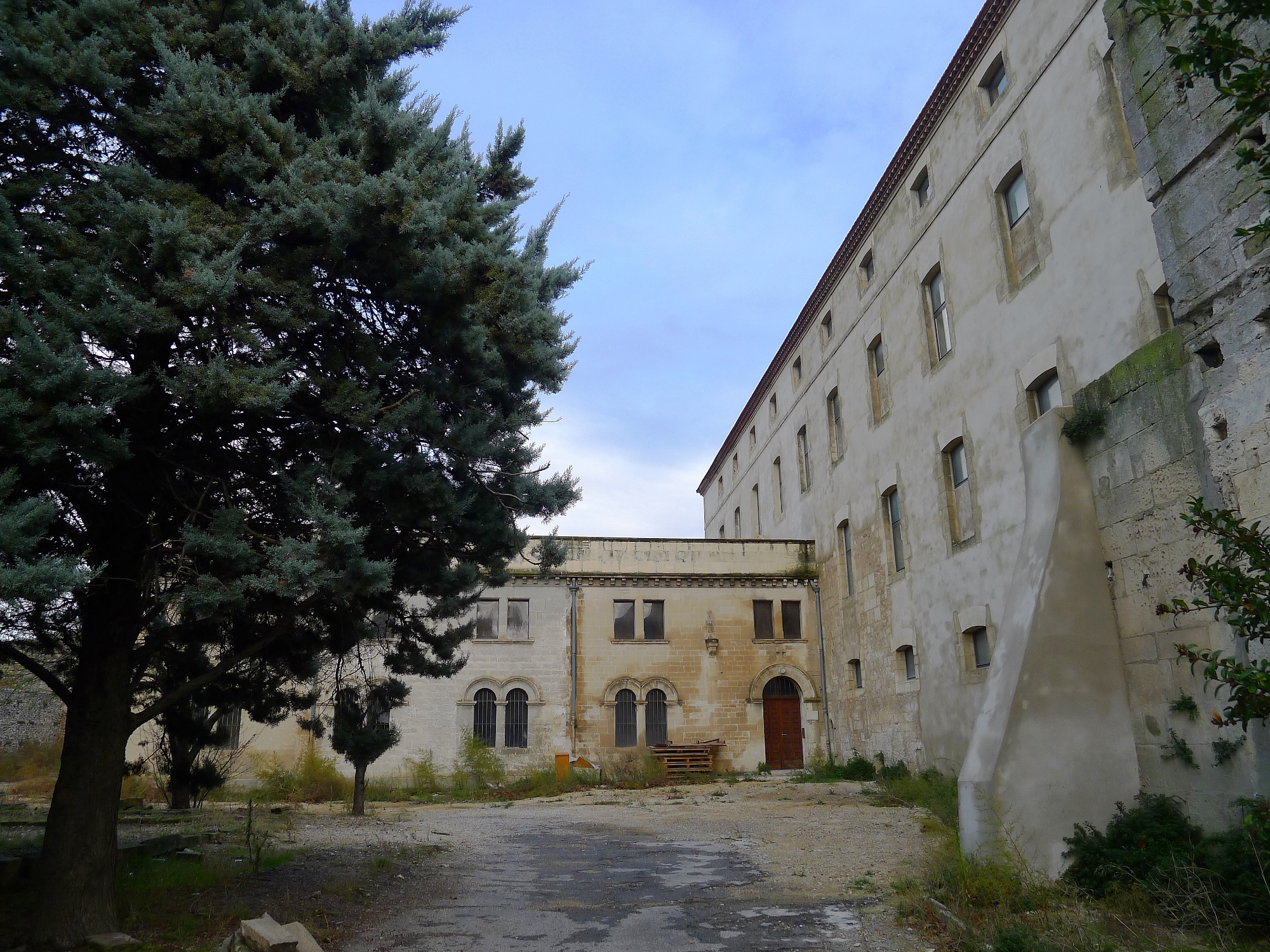 Enclos Saint-Césaire à Arles (Bouches-du-Rhône, France), bâtiment ancien à l'arrière de l'hospice Saint-Césaire.